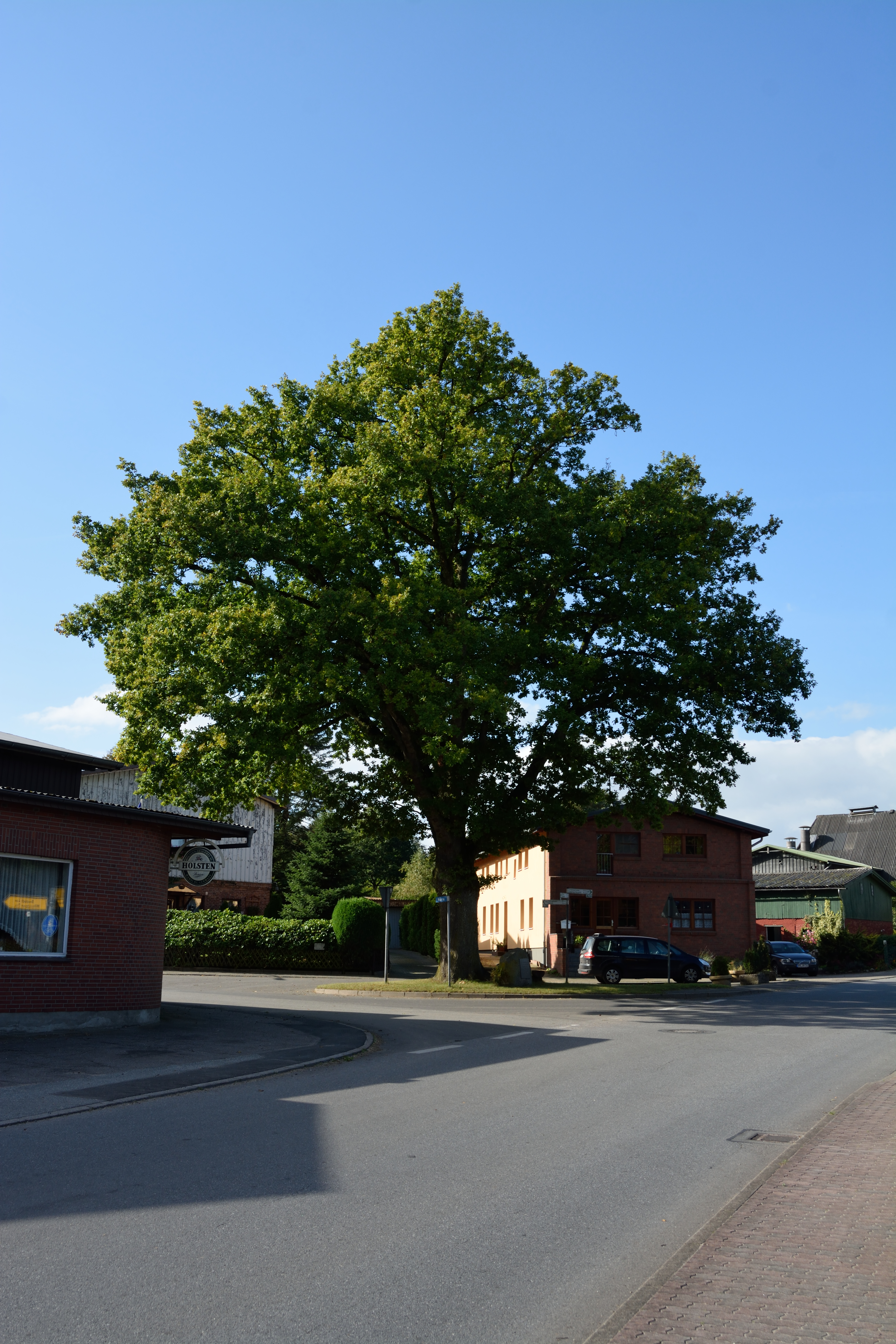 Eiche zum Gedenken am Kaiser Wilhelm I